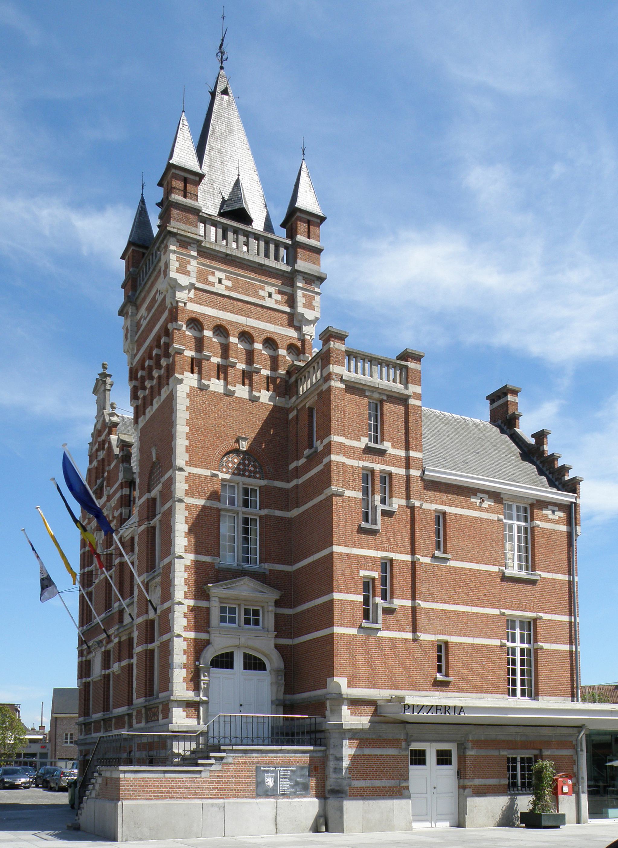 Edegem (prov. Antwerpen, België). Gemeentehuis, archit. Charles Janssens, anno 1911.